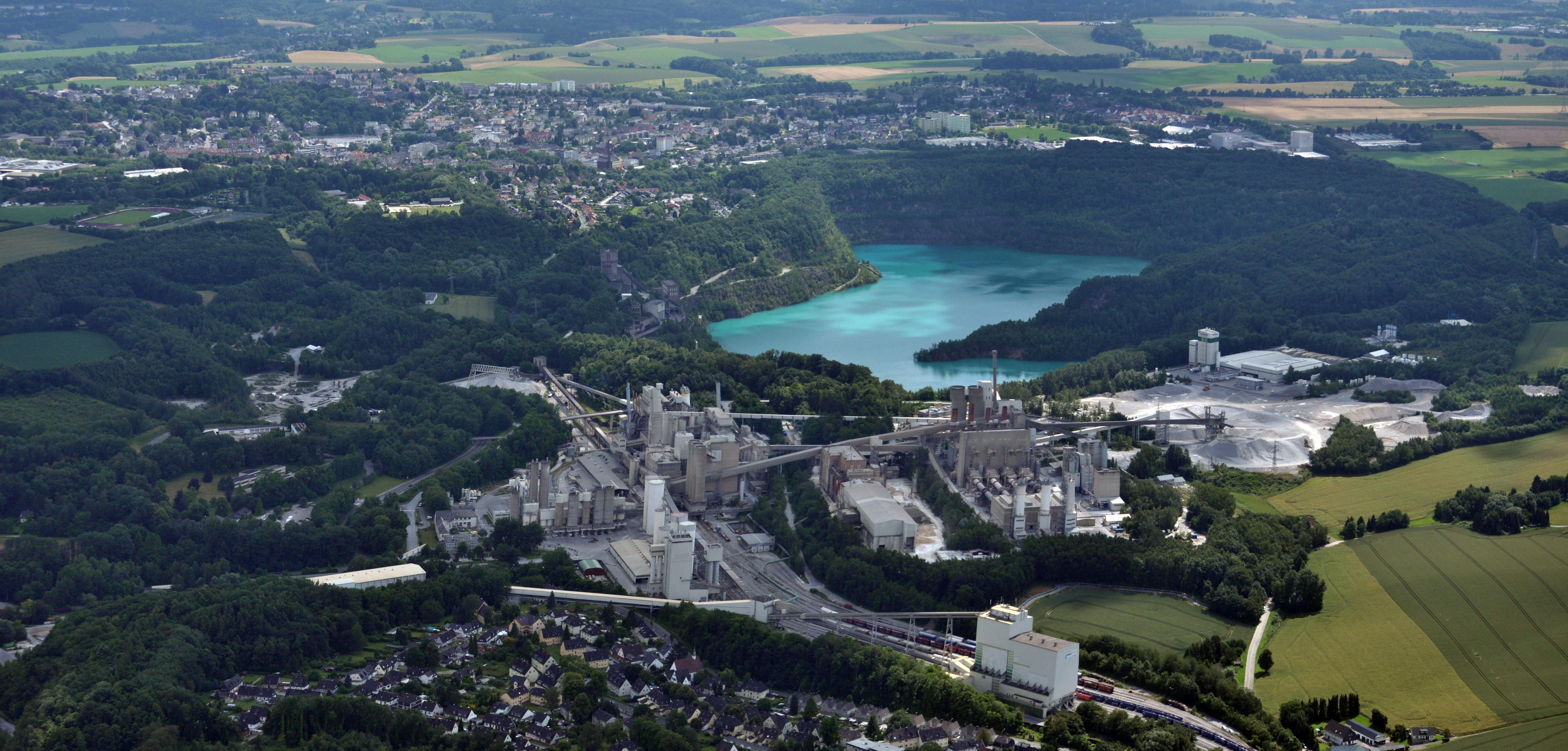 Kalkwerk in Wülfrath-Flandersbach. Dahinter die wassergefüllte Grube Prangenhaus; im Hintergrund Wülfrath Aufnahme von Westen; Luftbild aus ca. 600m Höhe über Grund